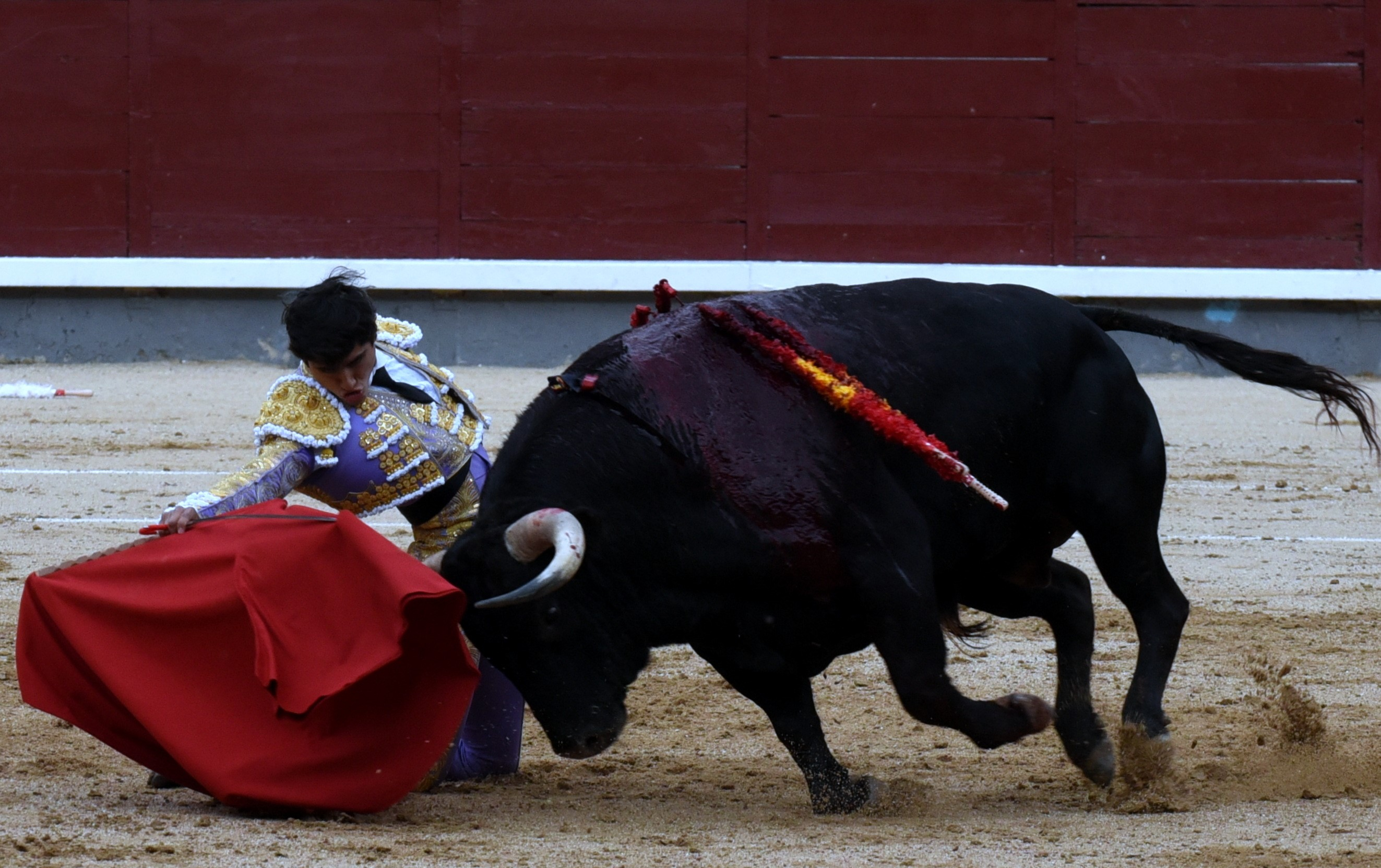 Luis David Adame aplica un derechazo mandón y templado a un toro de embestida veloz.